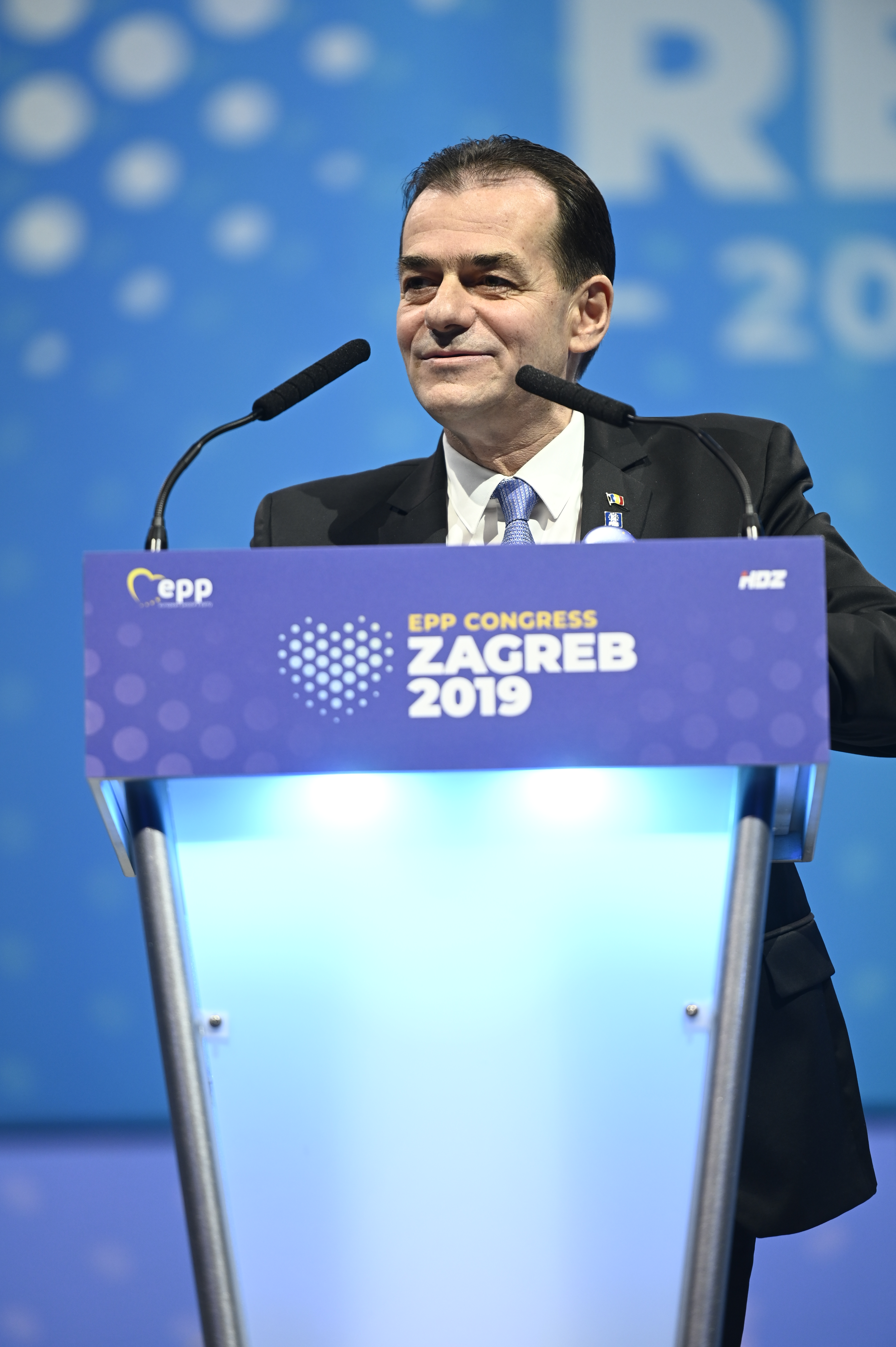 20-21 November 2019